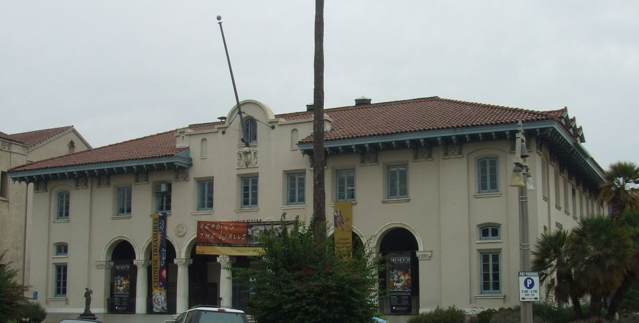 Riverside Metropolitan Museum